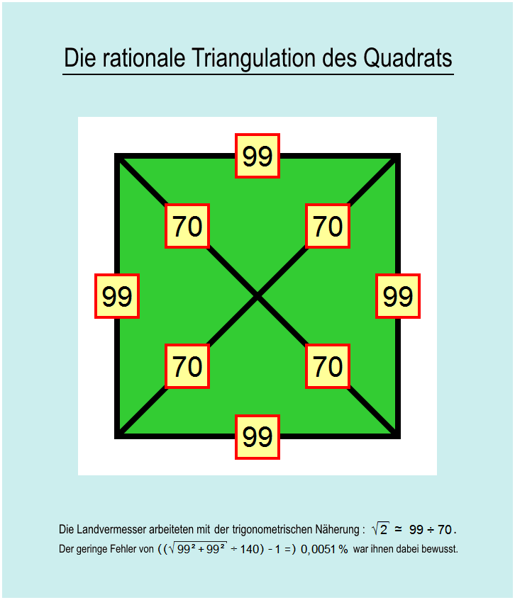 Approximation trigonométrique permettant aux arpenteurs d'attribuer une valeur rationnelle à la diagonale du carré